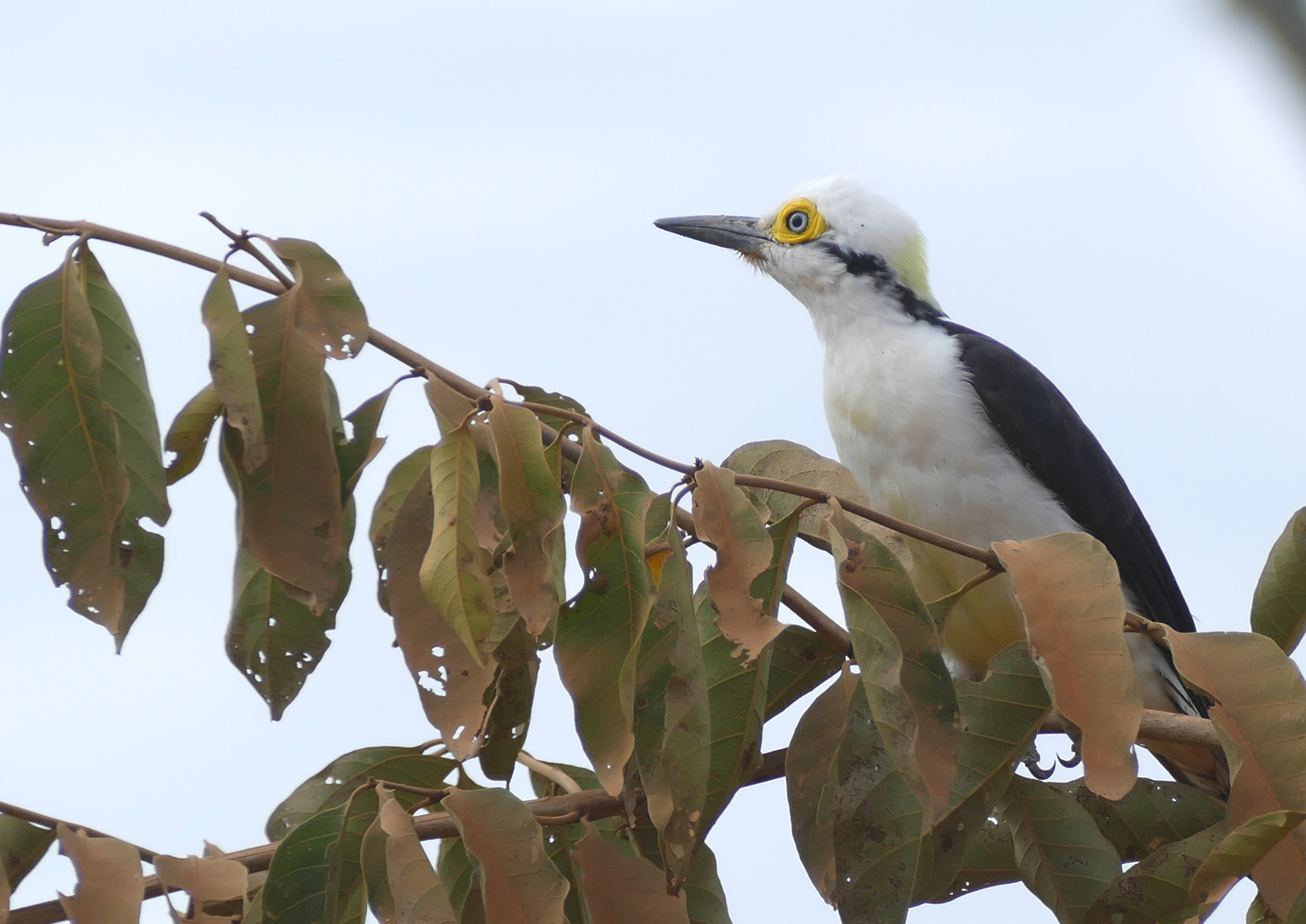 Transpantaneira, Poconé, Mato Grosso, BRAZIL